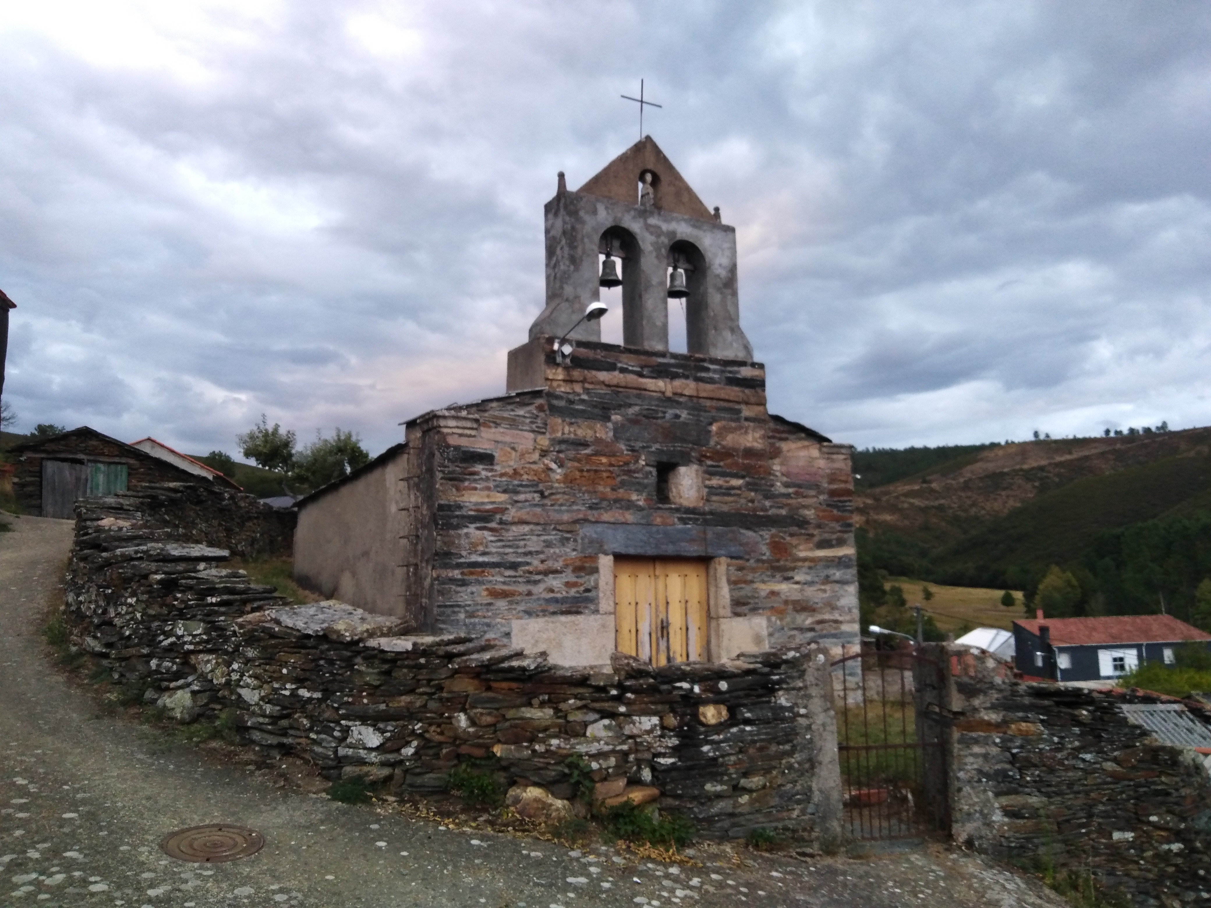 Igrexa de San Lucas de Parada da Serra